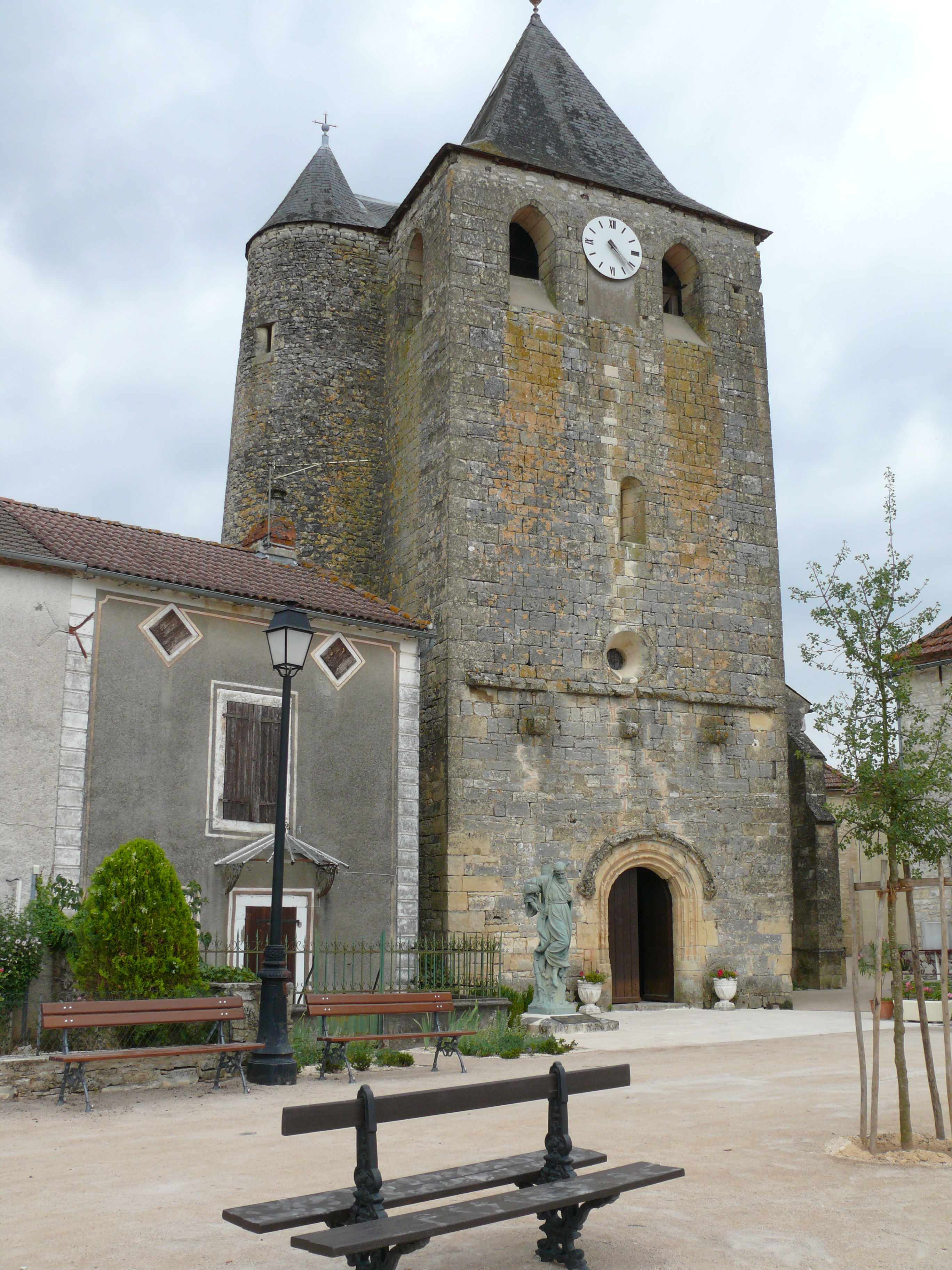 Montgesty - Eglise Notre-Dame-de-l'Assomption